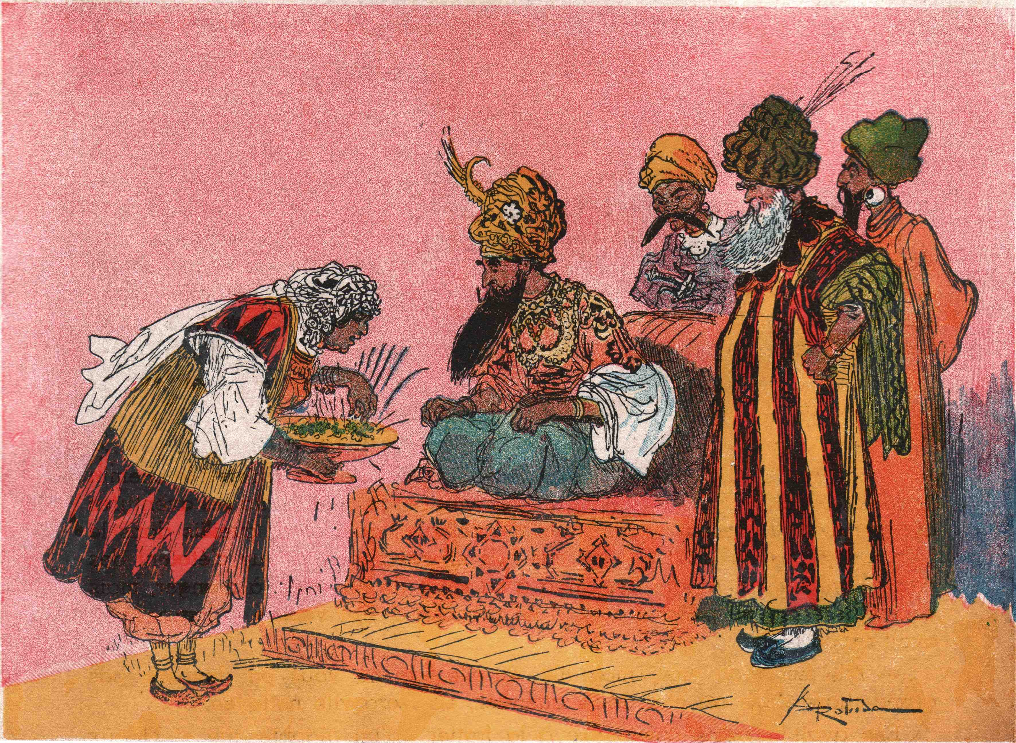 Aladin - illustré par Albert Robida - Paris - Imagerie merveilleuse de l'Enfance - Illustration de la page 4